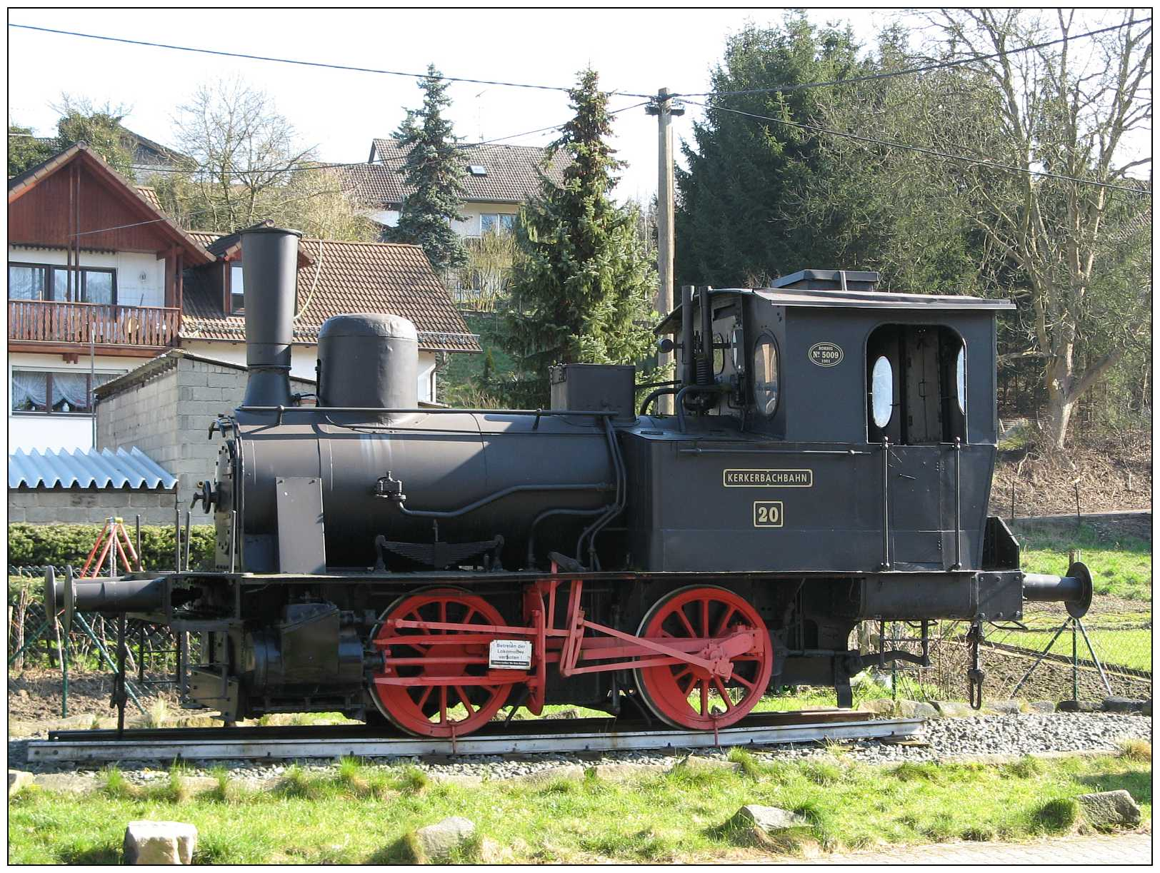 Lokomotive, Denkmal zur Erinnerung an die Kerkerbachbahn, Model Borsig 5009, Baujahr 1901